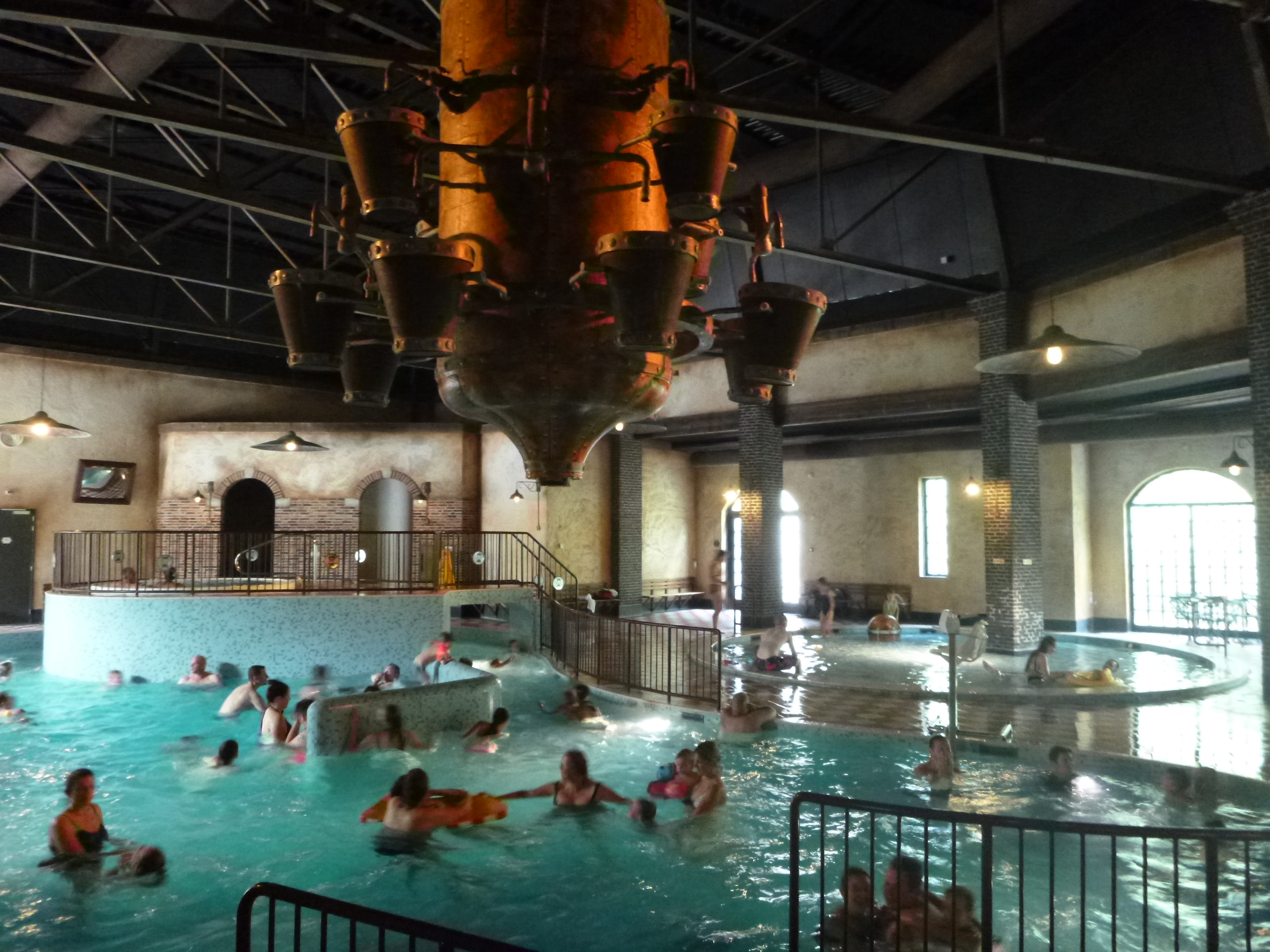 La piscine du Bosrijk à Efteling